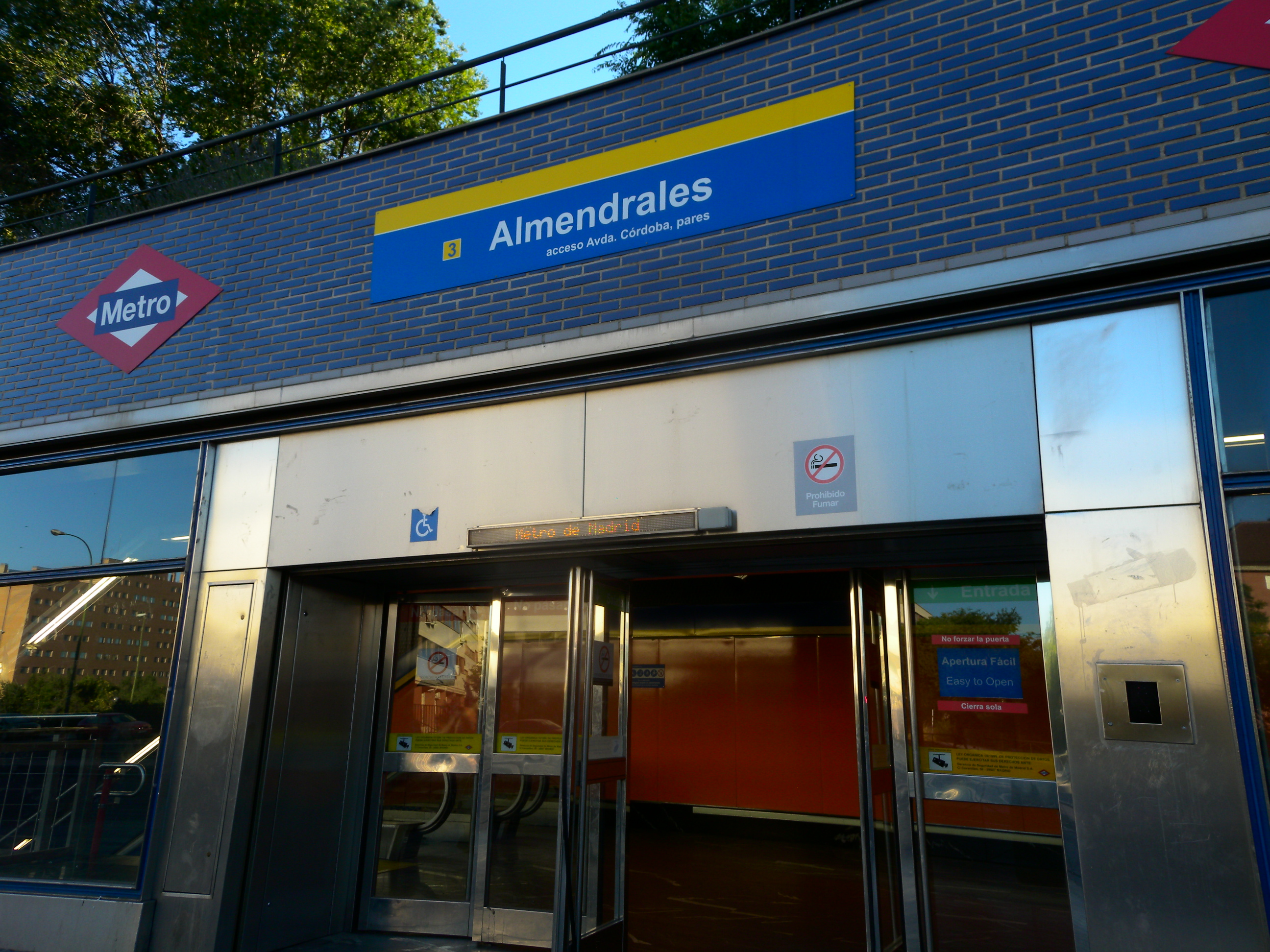 Metro de Madrid: (L3) Estación de Almendrales.